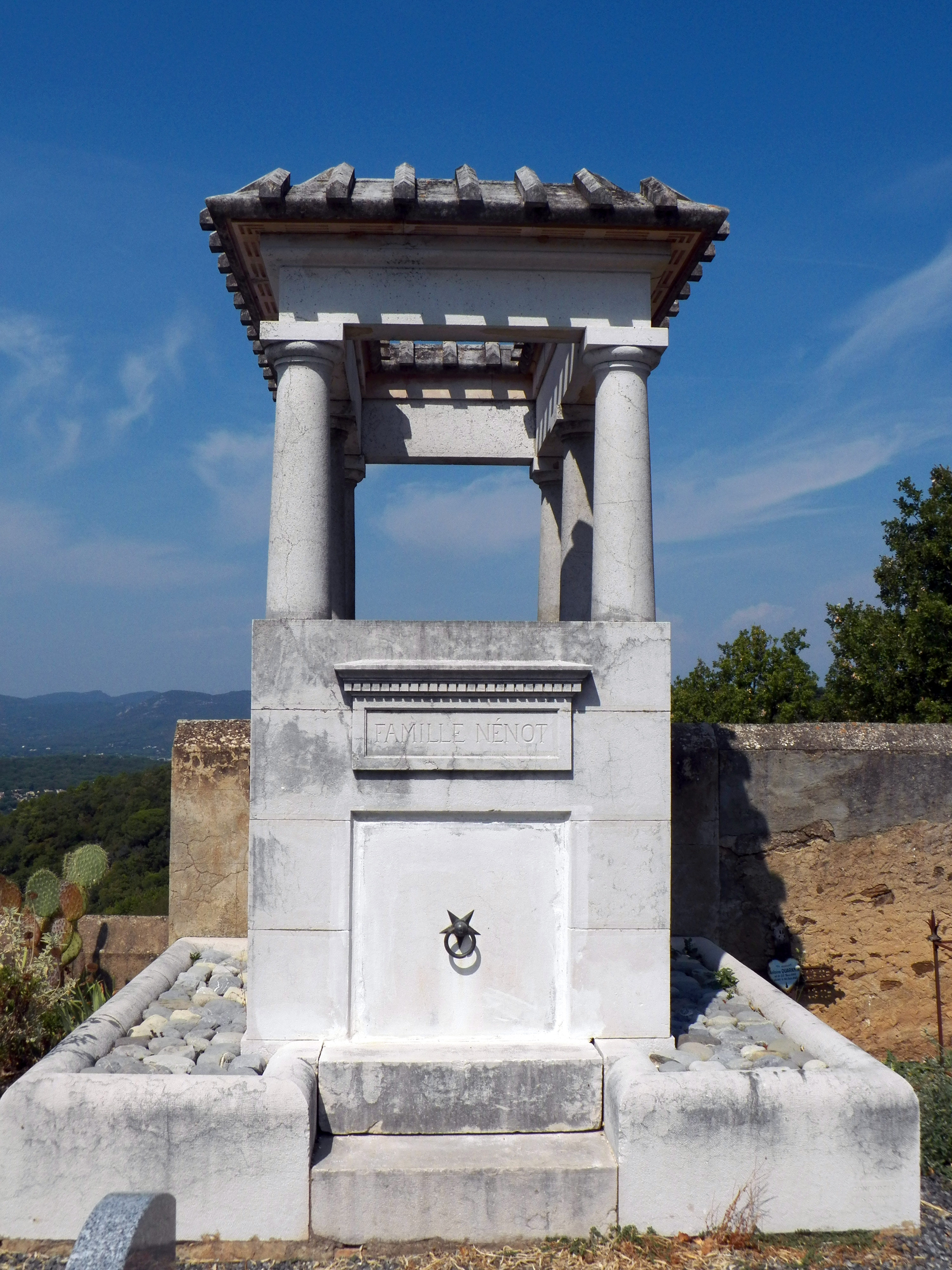 Monument mortuaire de la famille Nénot à Gassin, rappelant fortement le monument aux morts situé dans le même axe.